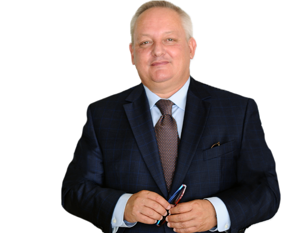 la foto contiene Stefano Bruno galli, è stata scattata da me oggi 2019/03/20.